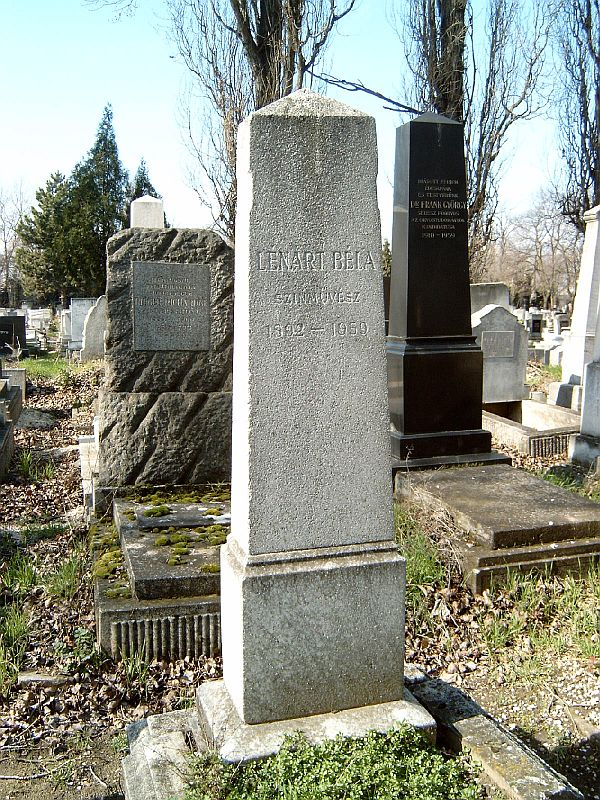 Lénárd Béla (Bécs, 1892. jún. 1.–Bp., 1960) színész sírja Budapesten. Kozma utcai izraelita temető: 1C-6-31.